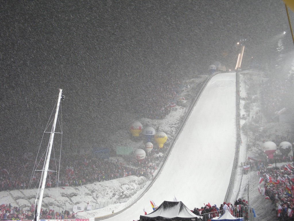 Zdjęcie zrobione podczas benefisu Adama Małysza w Zakopanym.